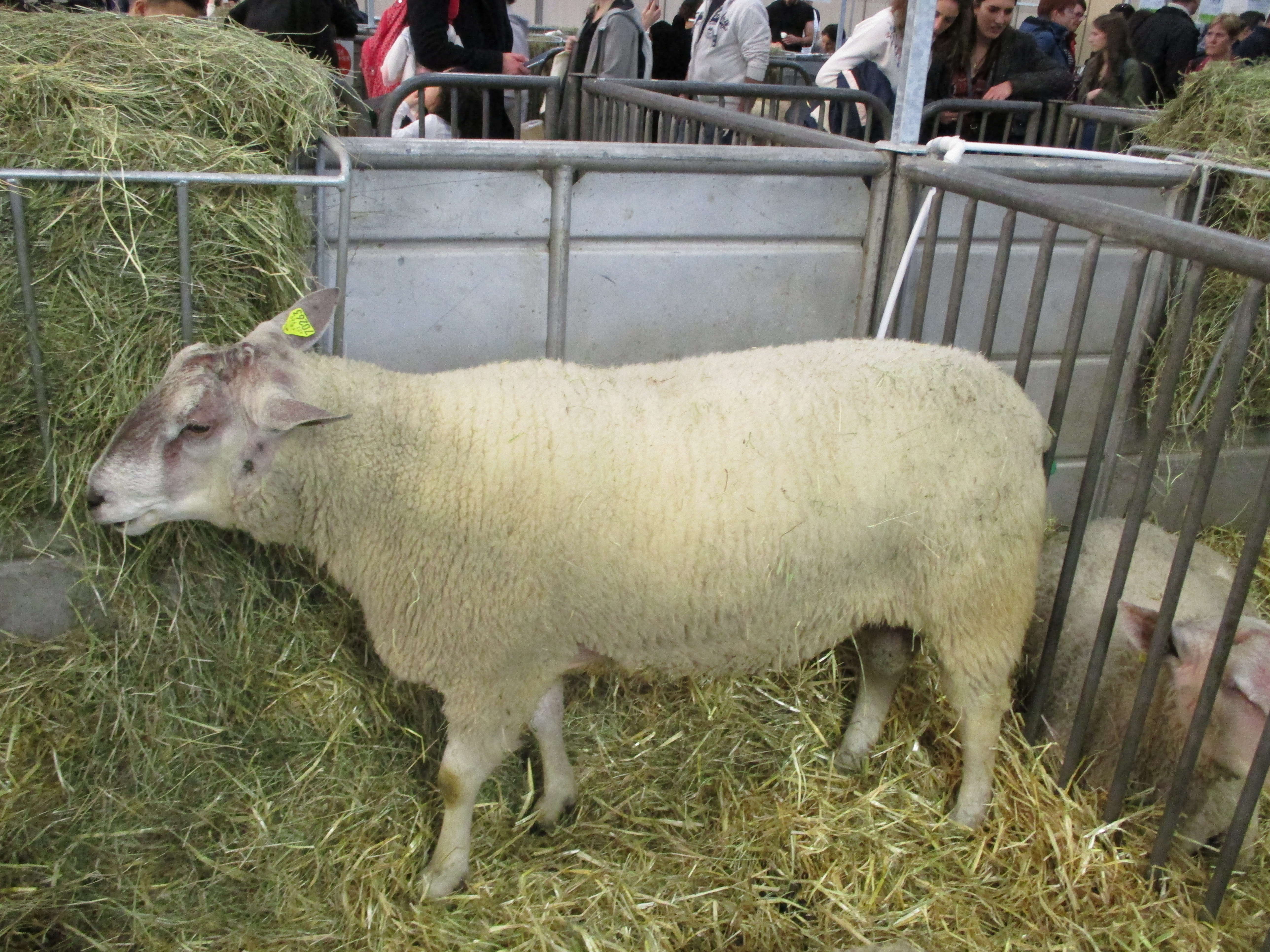 Mouton boulonnais au SIA 2019.